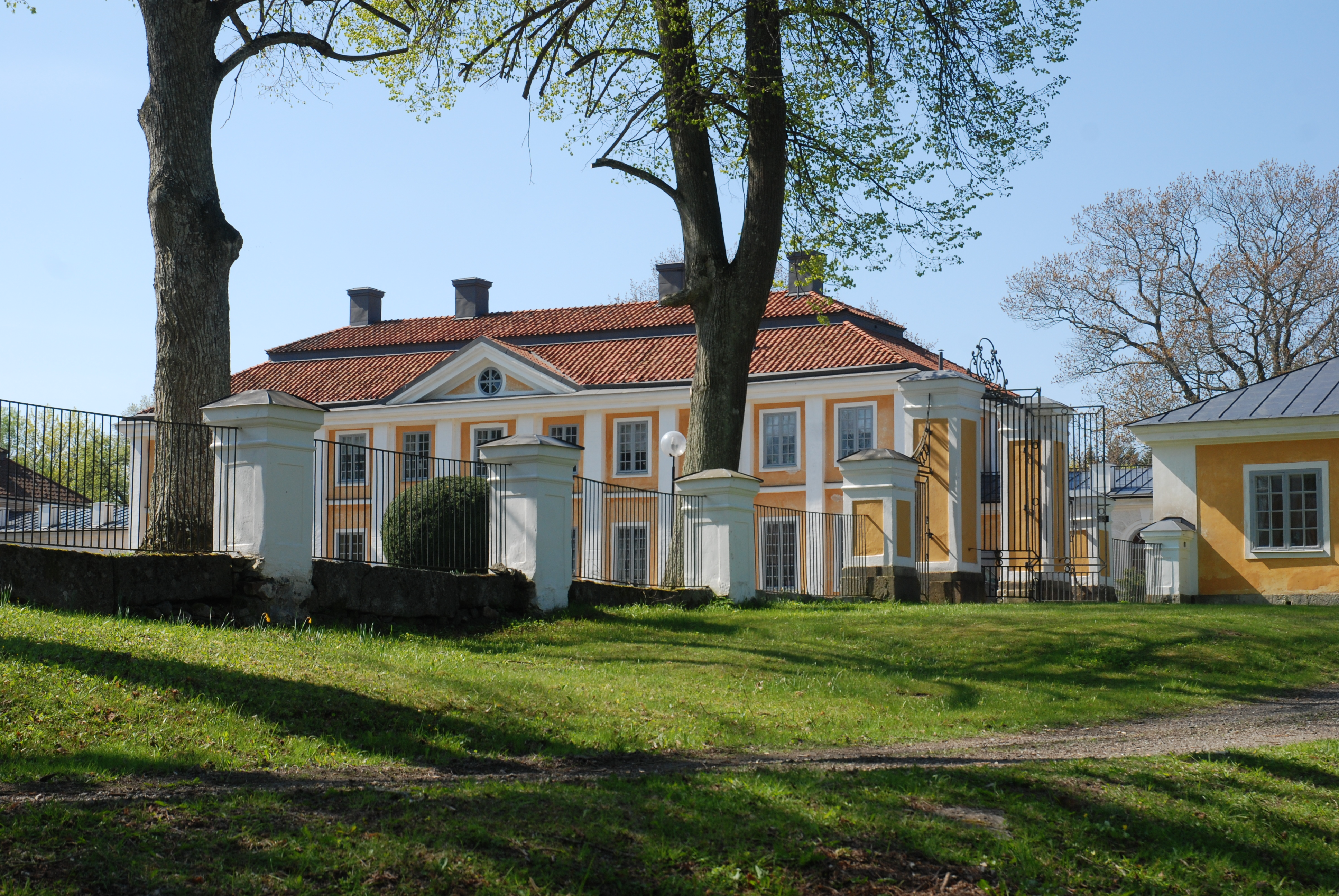 Foto över slottet Grensholm.